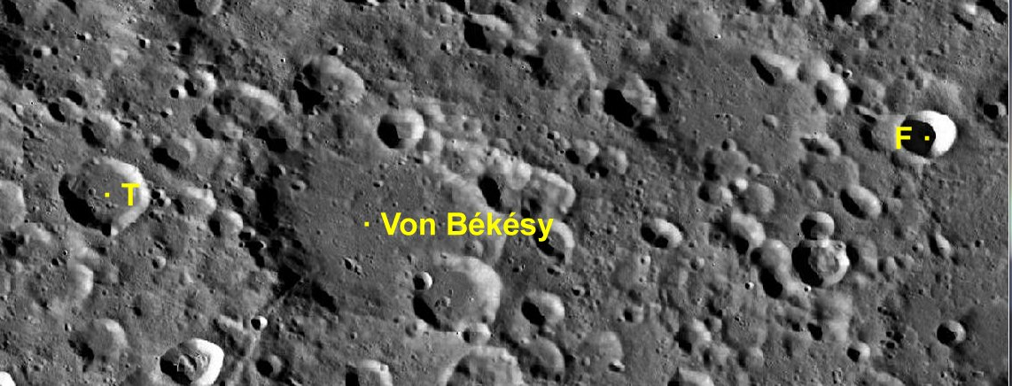 Cráter lunar Von Békésy. Cráteres satélite. (imagen LRO)